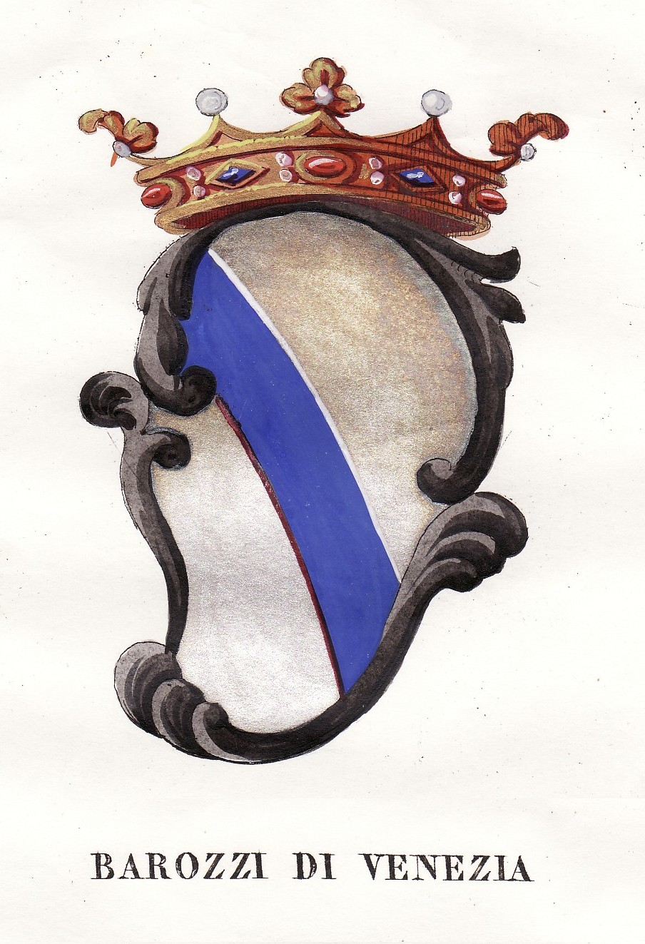 armes de la famille Barozzi